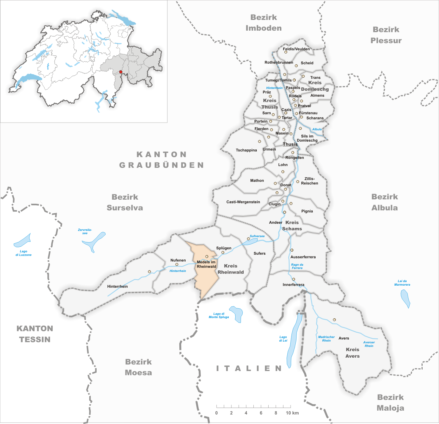 Municipality Medels im Rheinwald Artist: Tschubby